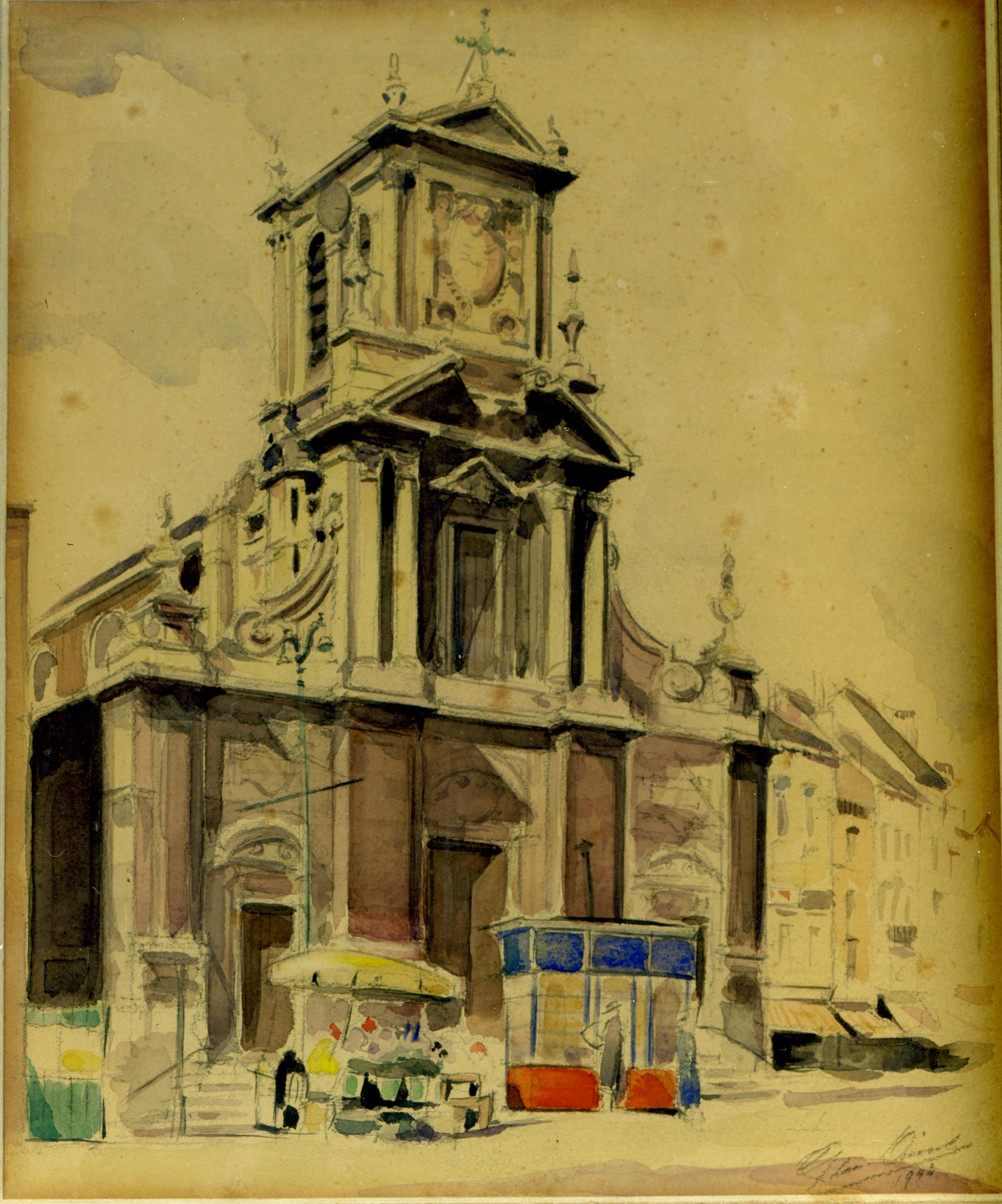 L'église de Saint-Josse-ten-Noode, Bruxelles (Chaussée de Louvain 99, église paroissale Saint-Josse)